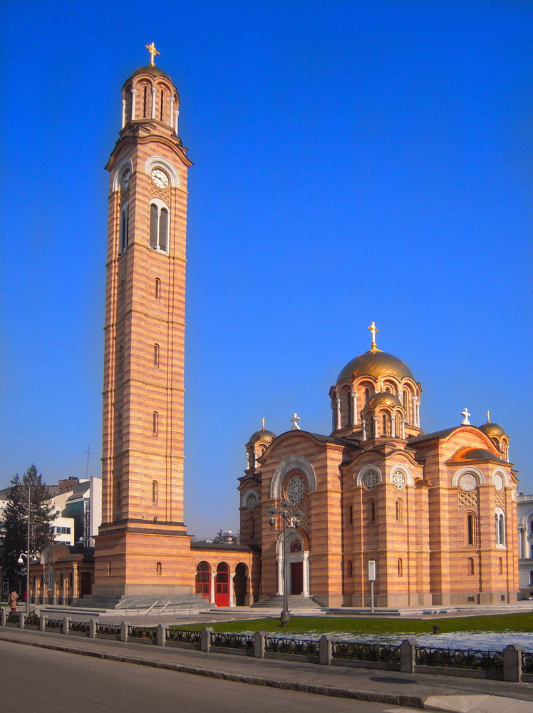 Храм_Христа_Спаситеља_у_Бањој_Луци